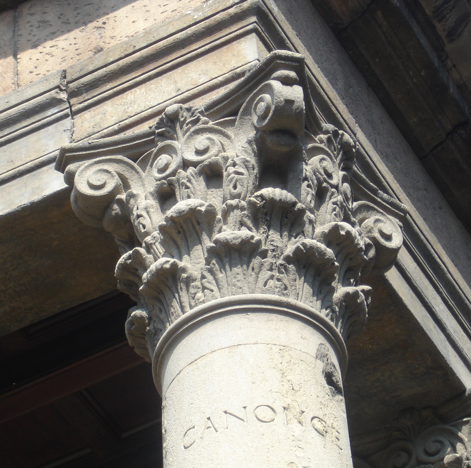 Temple romà de Vic (Vic, Osona, Catalunya, Espanya)